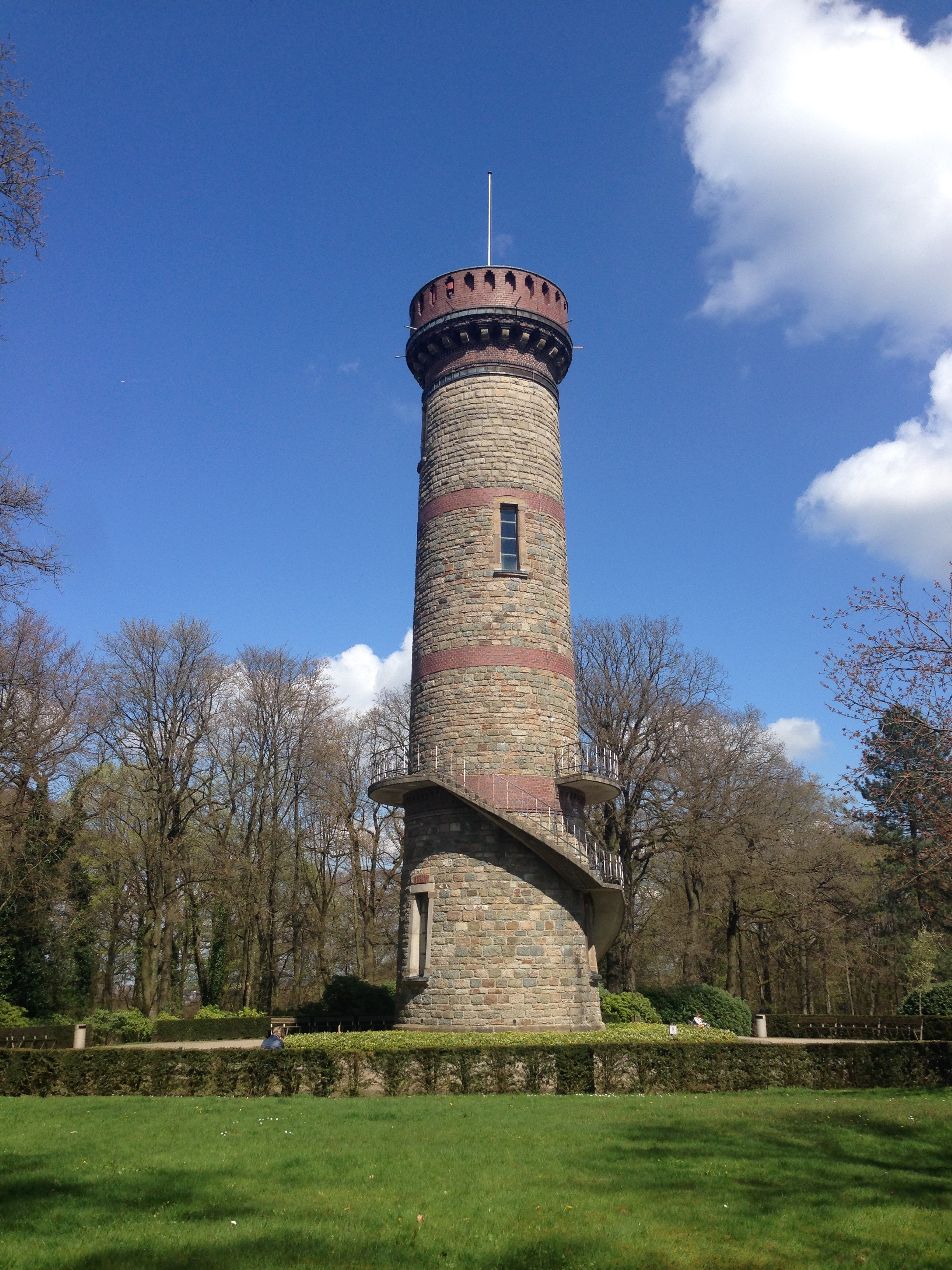 Der Wuppertaler Toelleturm in den Barmer Anlagen, April 2016.